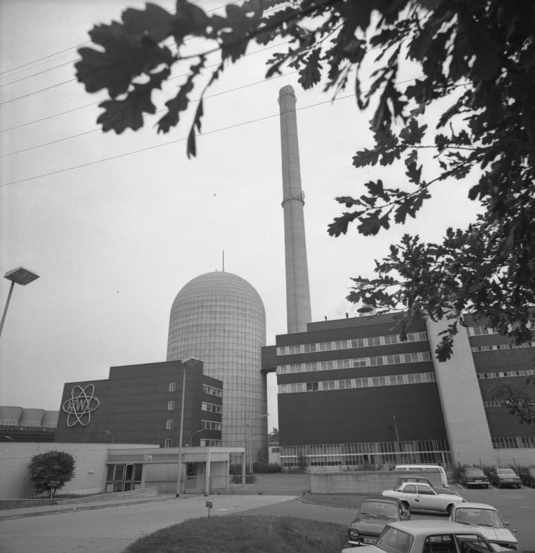 Kernkraftwerk Lingen/Ems